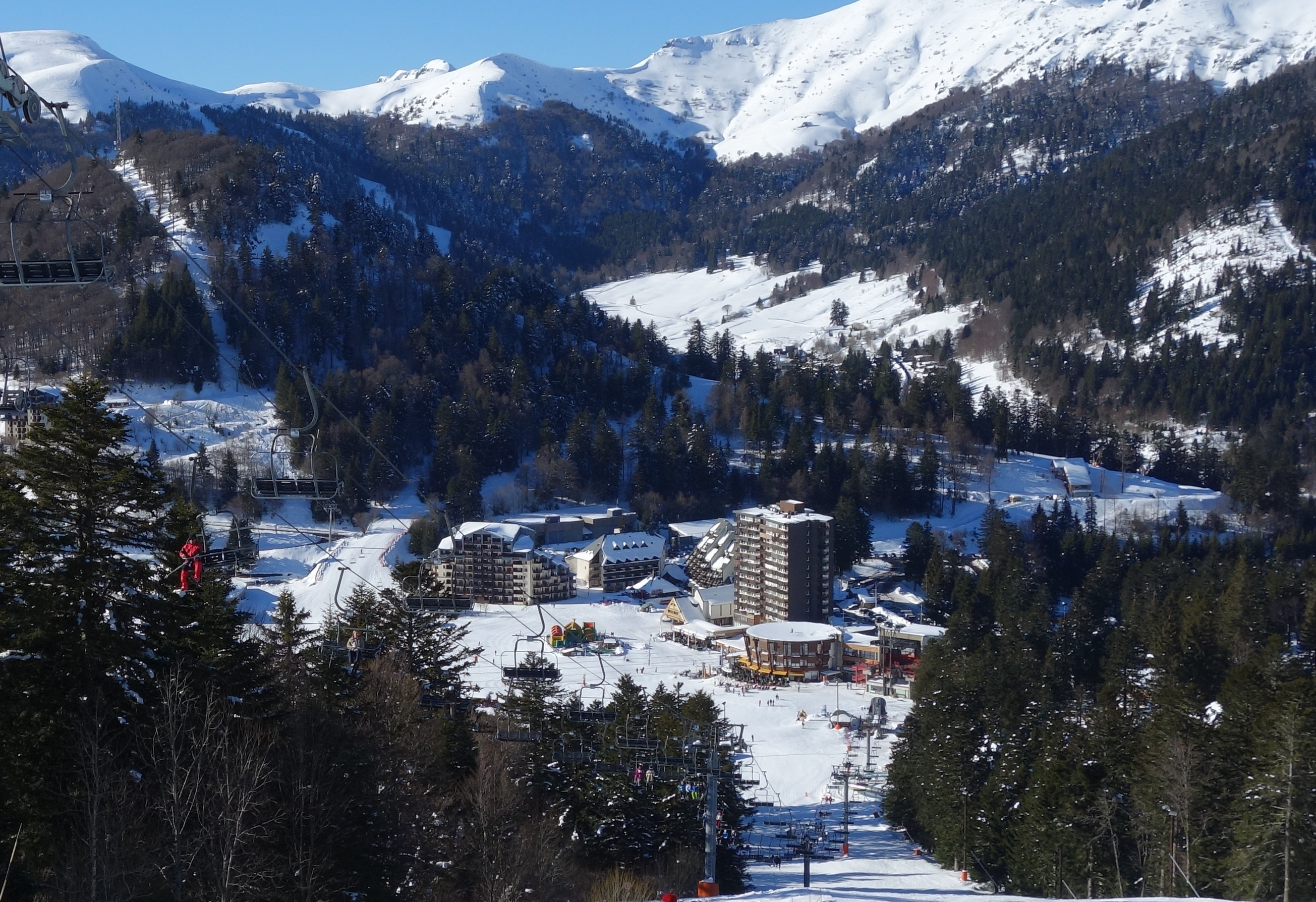 Vue générale sur la station de ski du Lioran